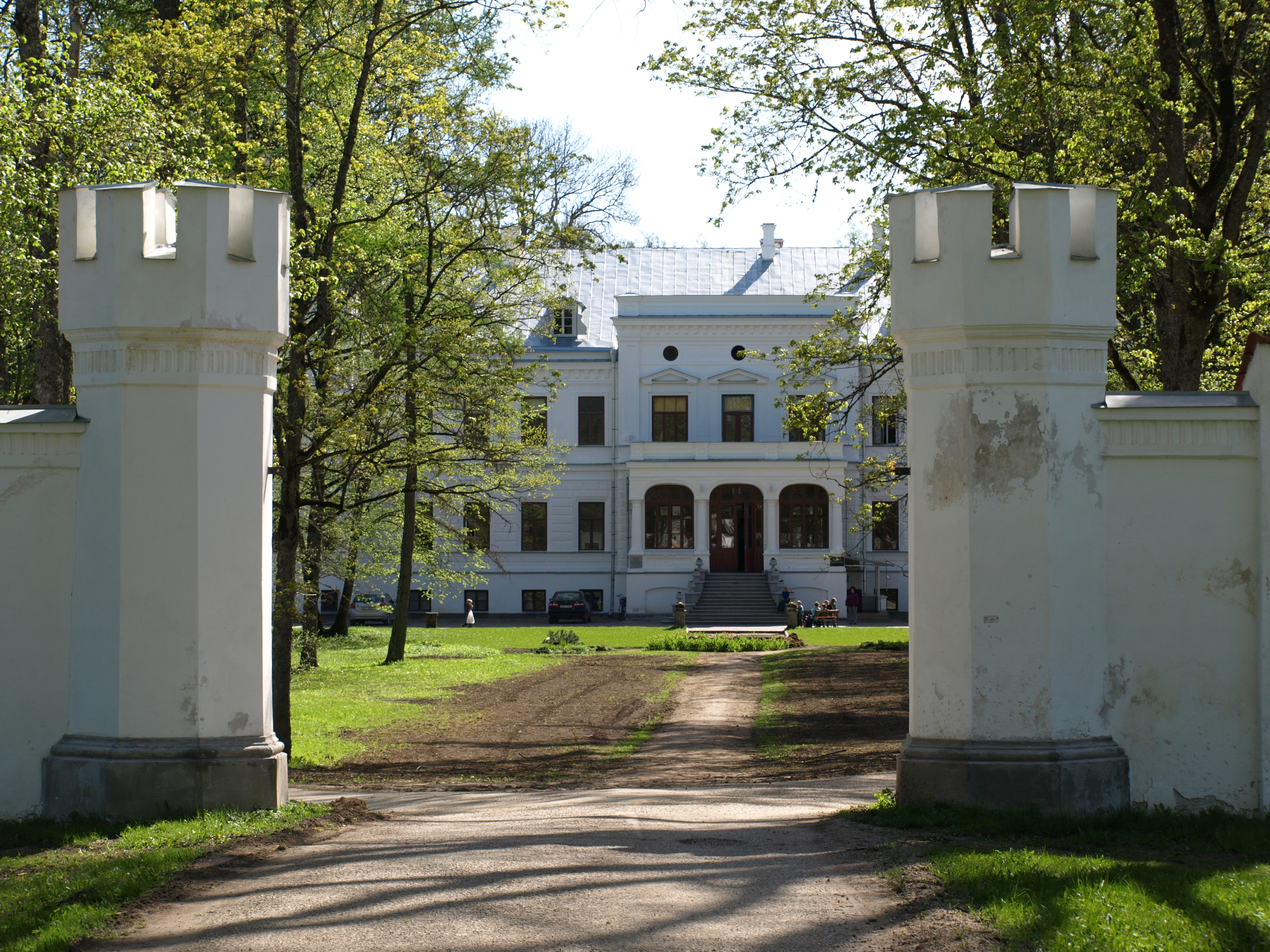 Puurmani mõisa pargi värav